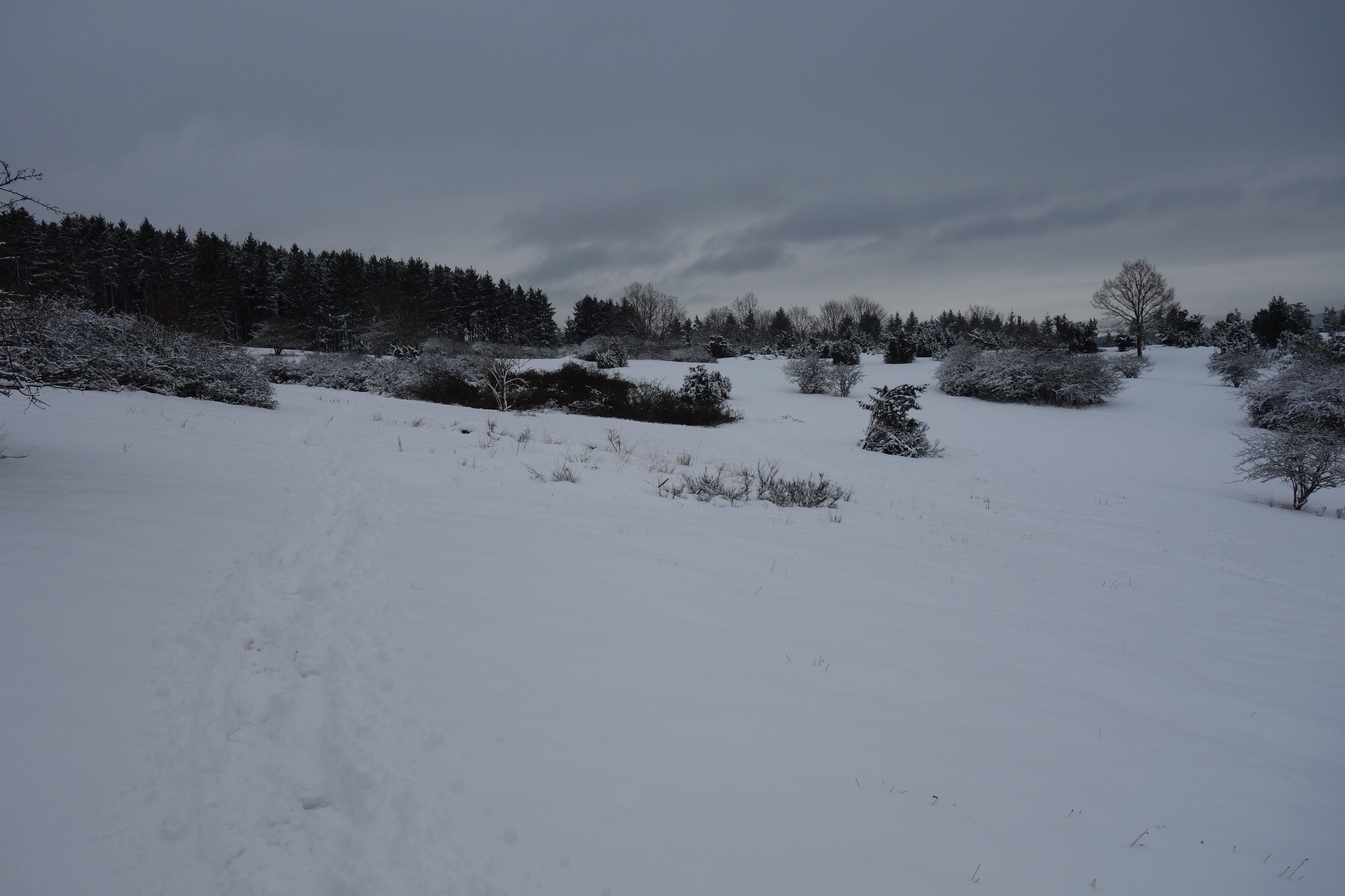 Naturschutzgebiet Heckenlandschaft Braunshausen im Winter bei über 20 cm Schnee.